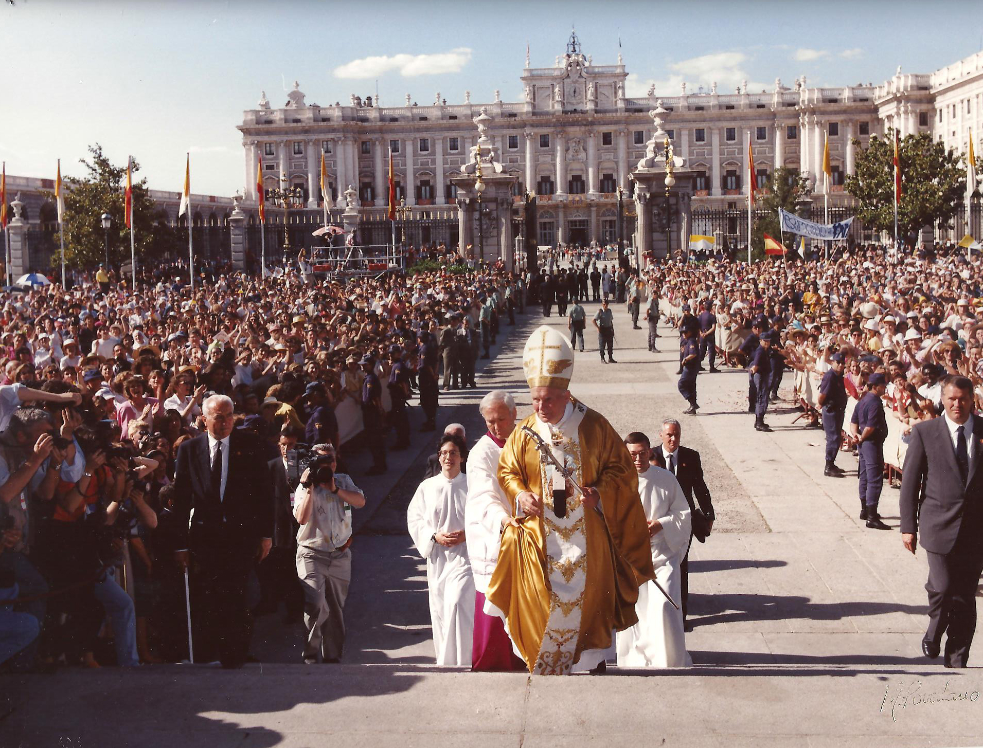 Bendición de la catedral de la catedral de la Almudena por Juan Pablo II el 15 de junio de 1993 Créditos: Archimadrid